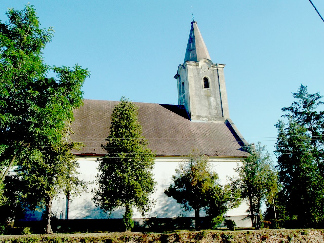 The Roman Catholic Church in Káptalantóti. Szent Márton püspök római katolikus templom